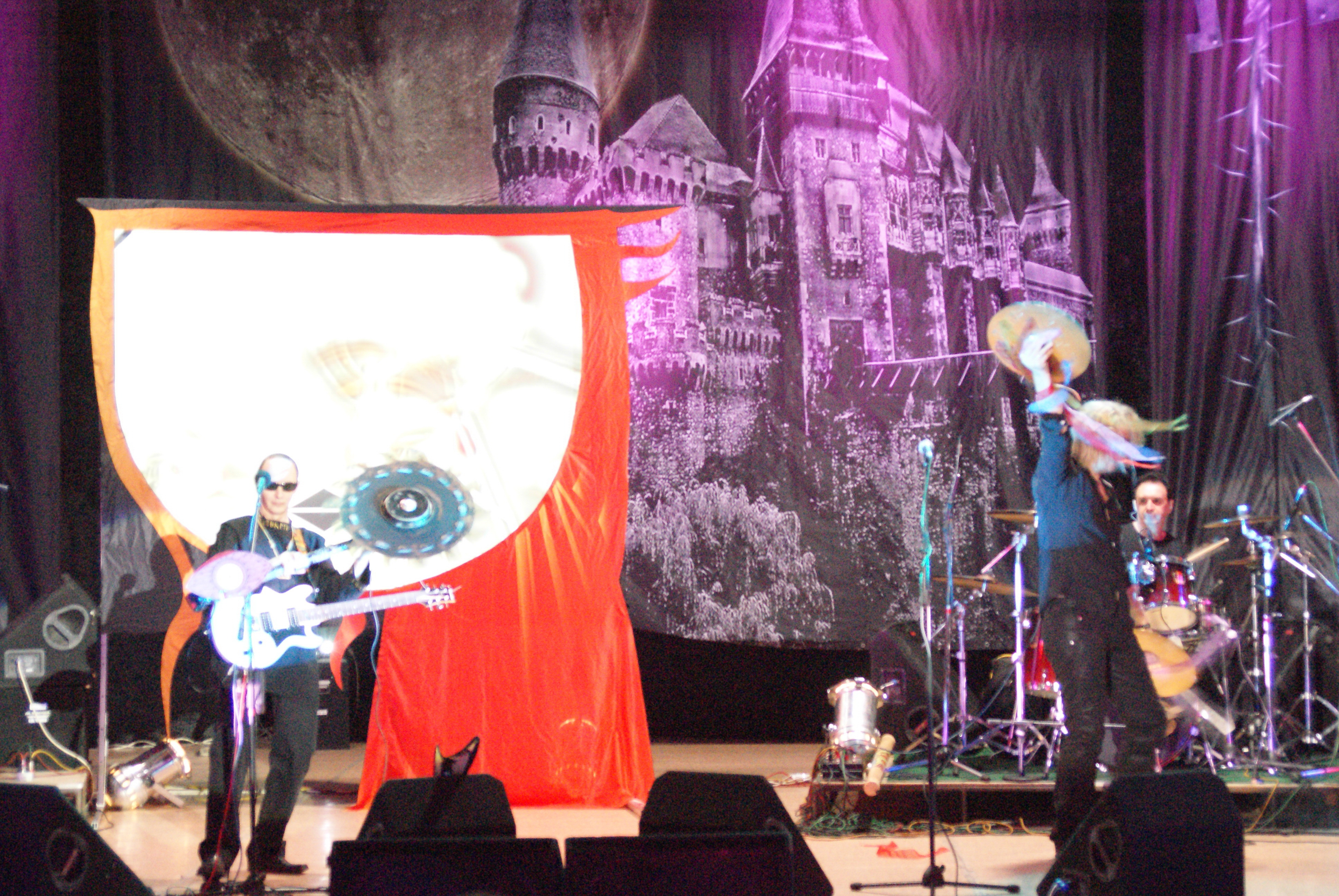 Группа Пикник на концерте в Саратове в ДК "Россия" 25 октября 2008 г.